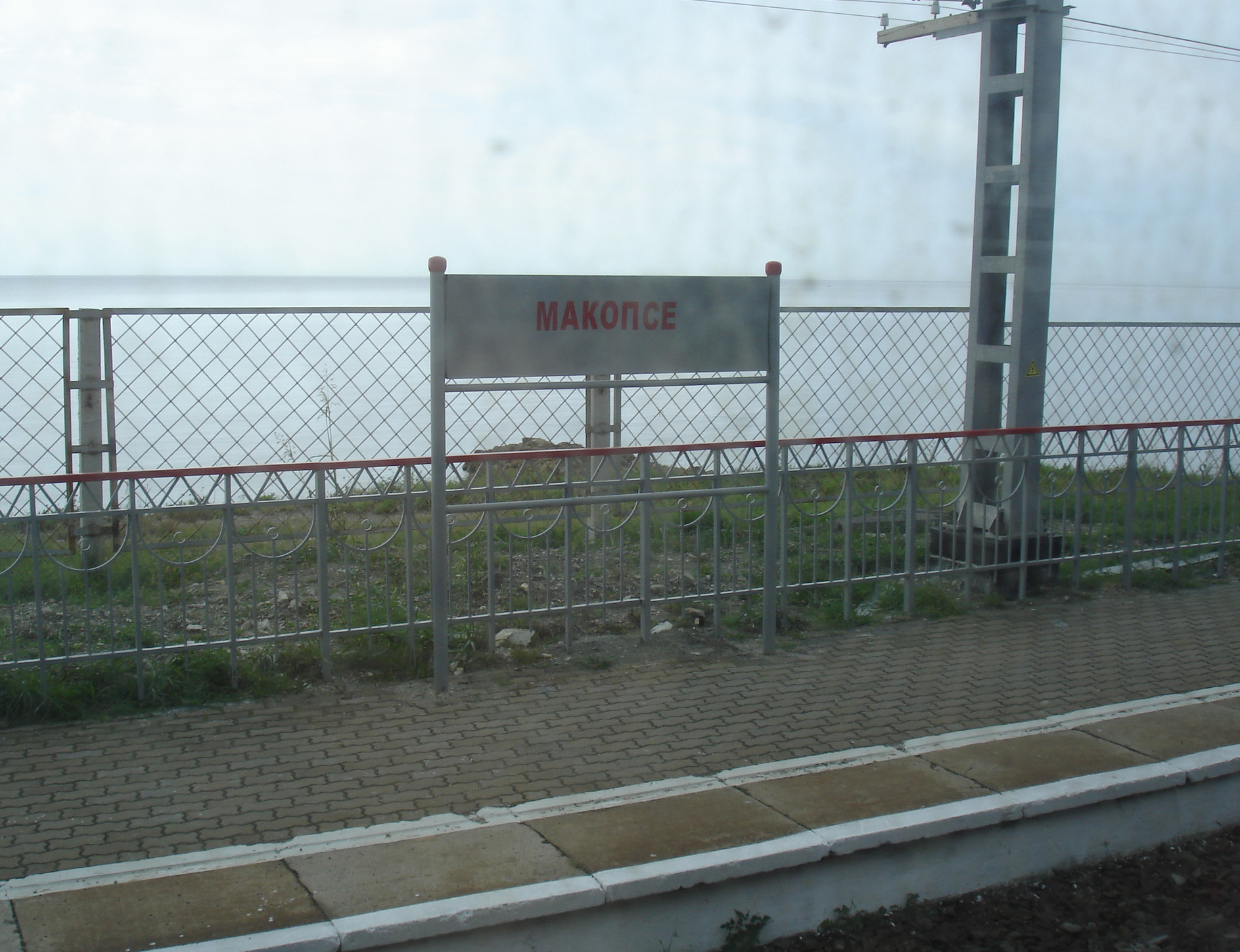 Железнодорожная станция Макопсе